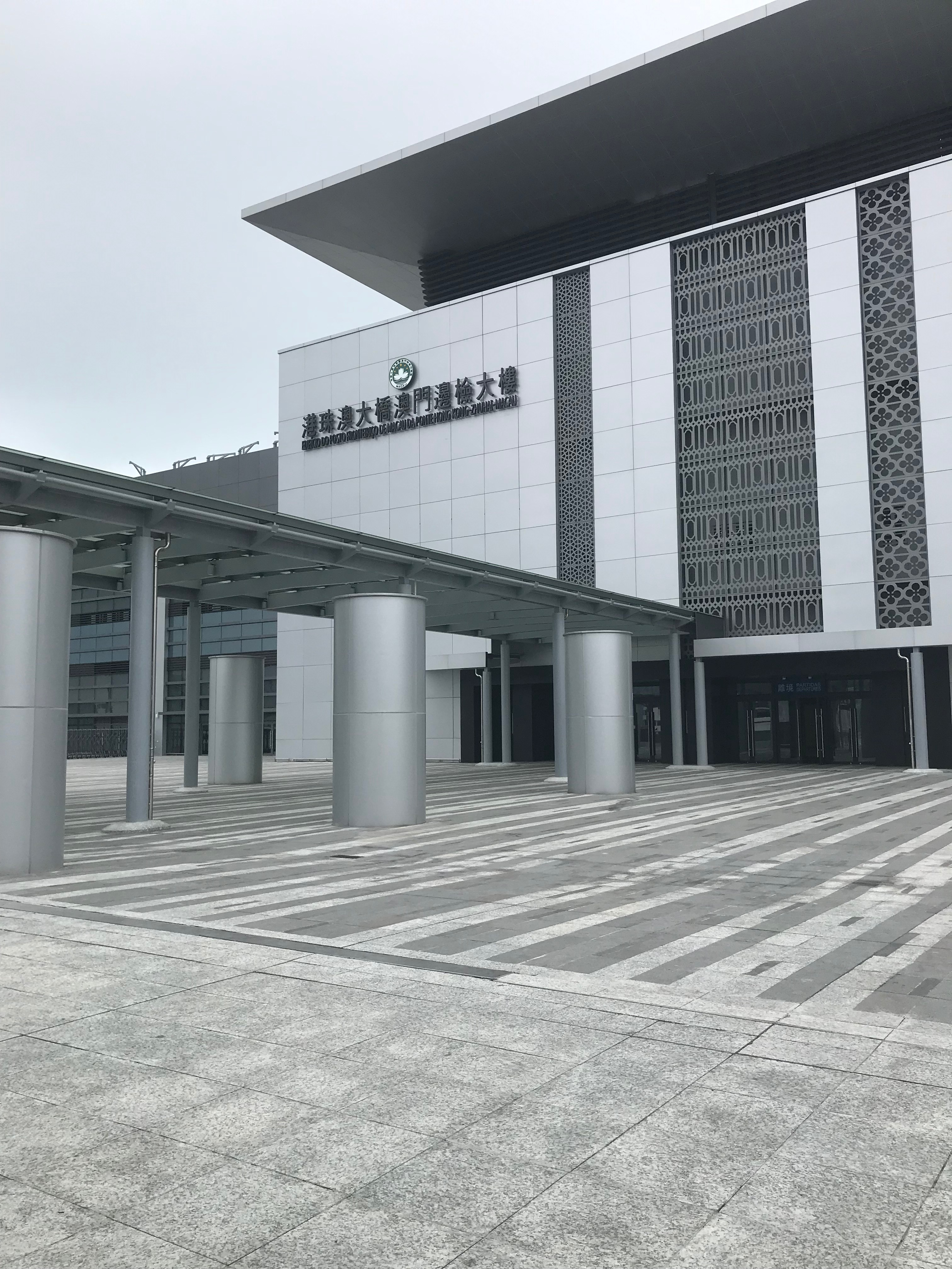 珠澳口岸人工島澳門口岸管理区にある港珠澳大橋澳門出入国ターミナル（澳門邊檢大樓）